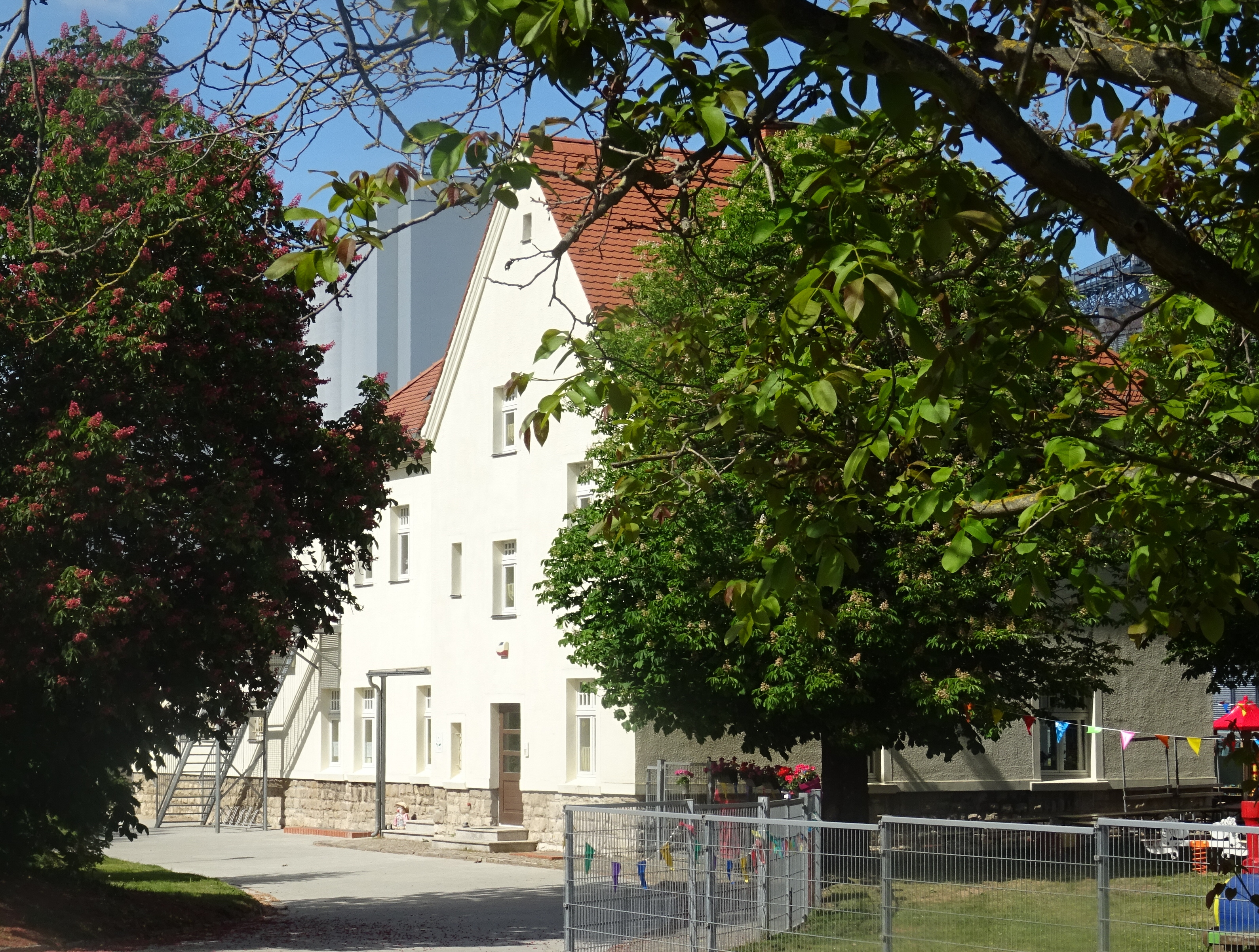 Alsleben, denkmalgeschütztes ehemaliger Bahnhofsgebäude, nun ein Kindergarten